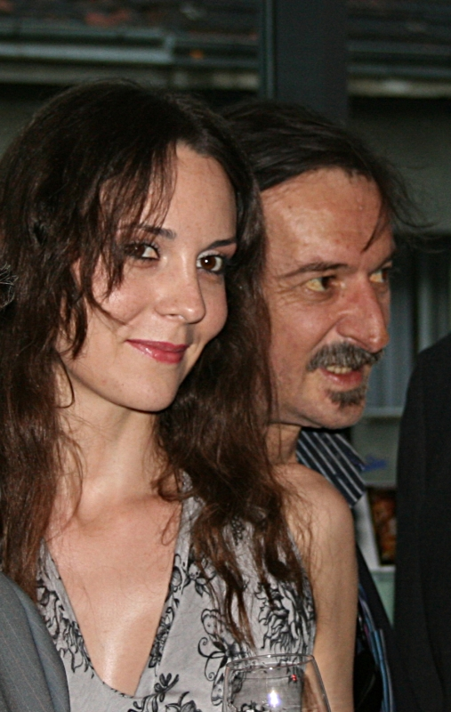 Premijera filma "Nije kraj" u Zagrebu, Nada Šargin i Predrag Vušović